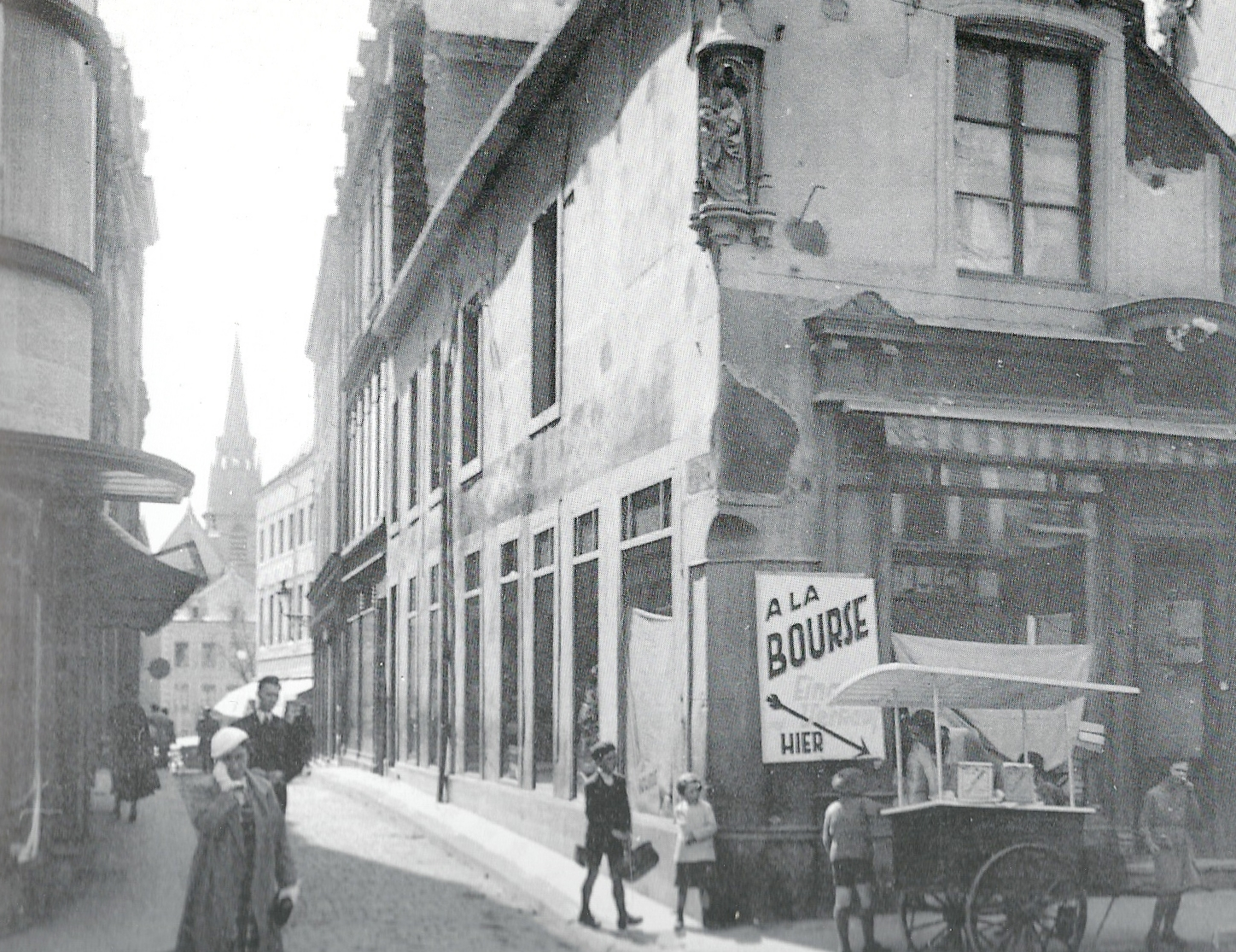 Luxembourg, magasin À la Bourse (vers 1930), avant la construction du nouvel immeuble